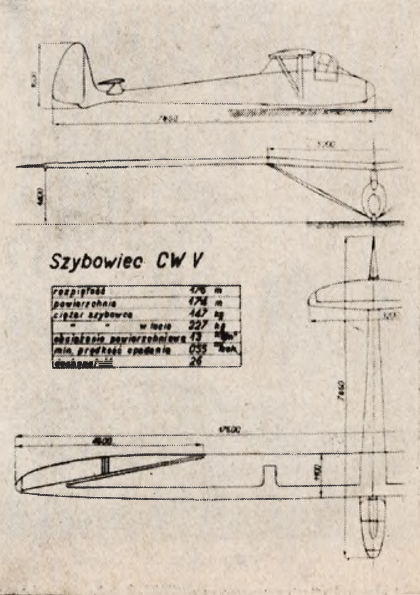 Rzuty szybowca CW-5 bis